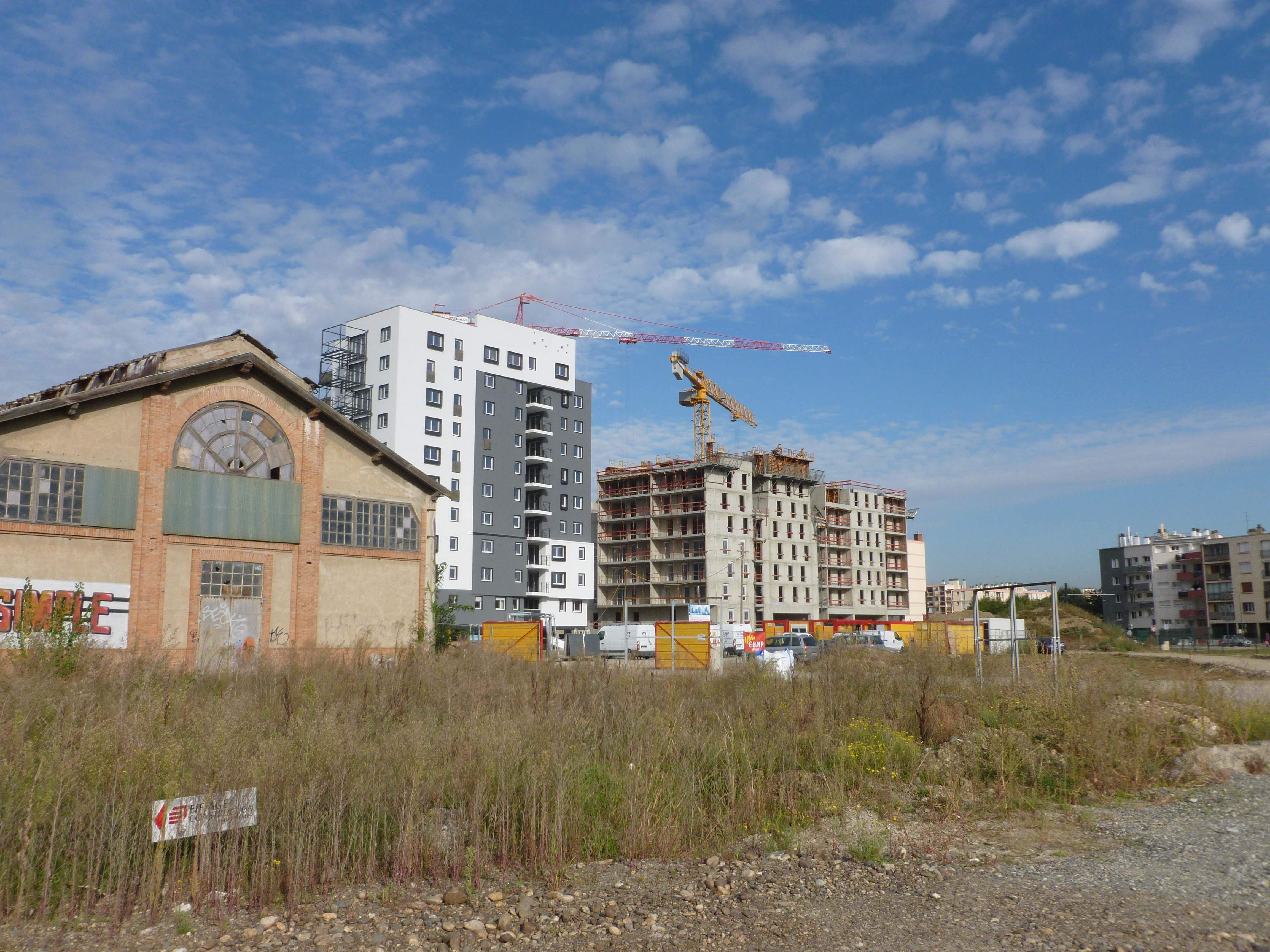 Chantier de la Cartoucherie à Toulouse (Haute-Garonne, France). Ancienne halle et premiers immeubles d'habitation.